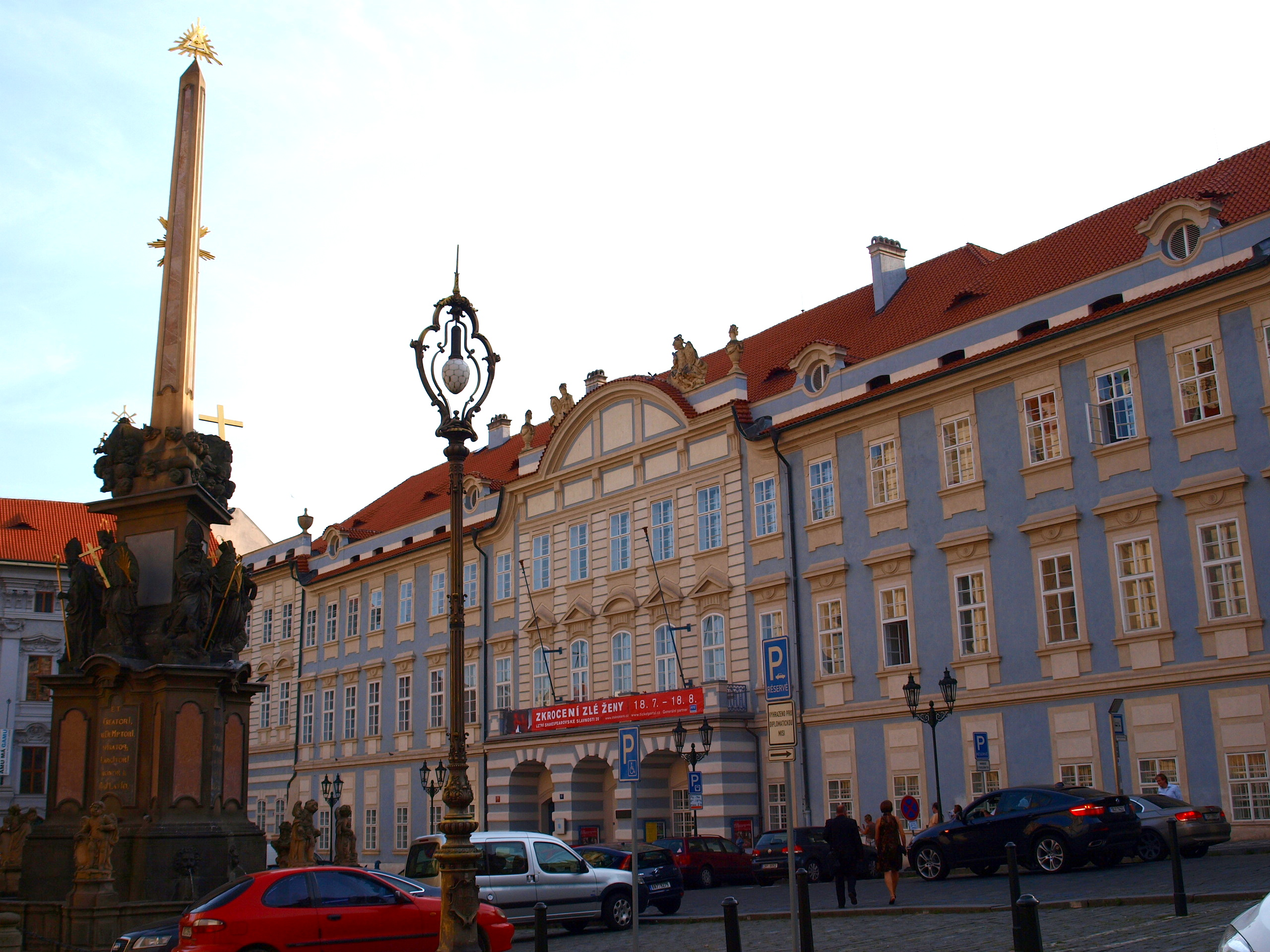 Lichtenštejnský palác (Malostranské náměstí)